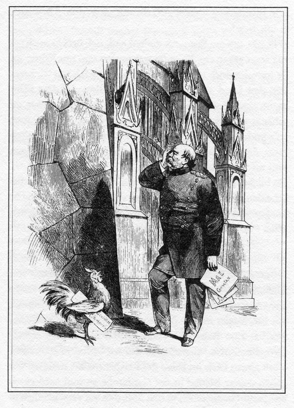 Бисмарк -реалист